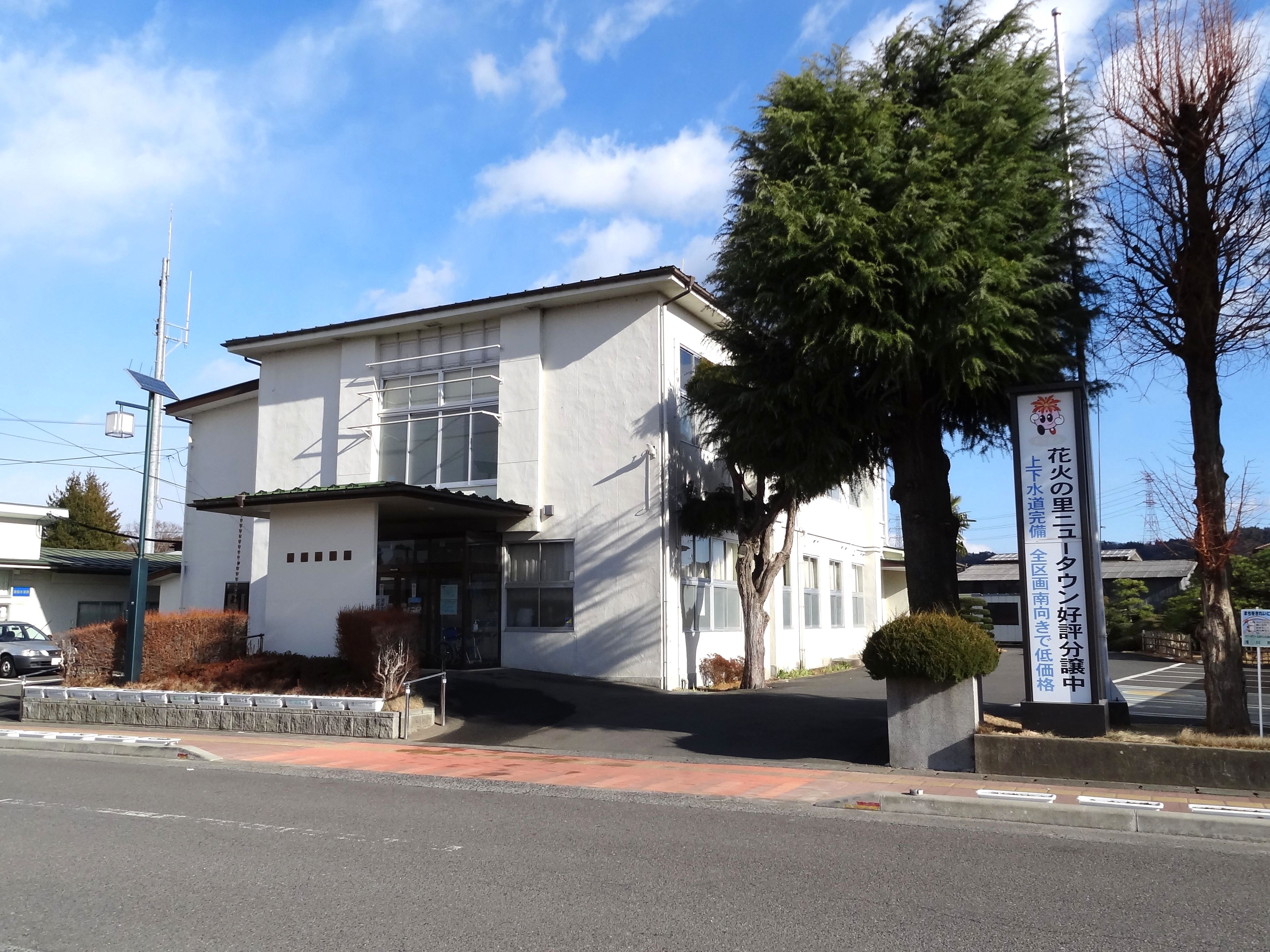 浅川町役場